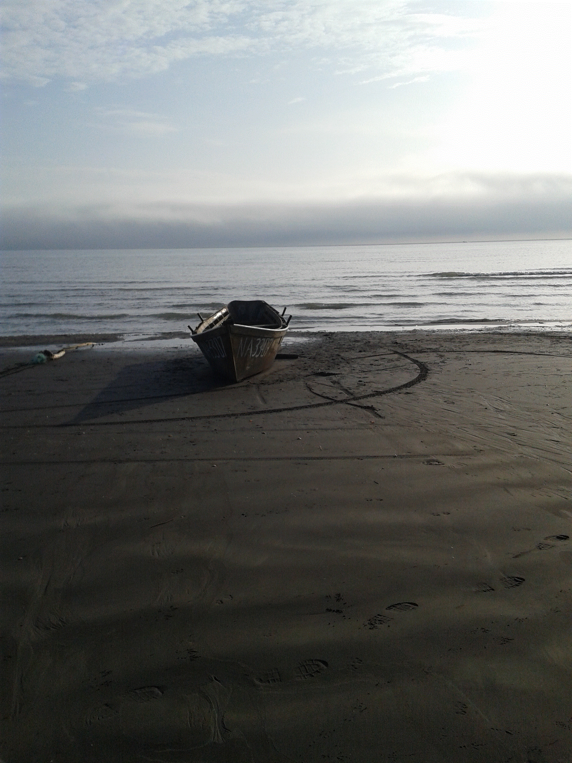 nabran deniz